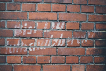 Mauerschrift der Luftschutzpropaganda